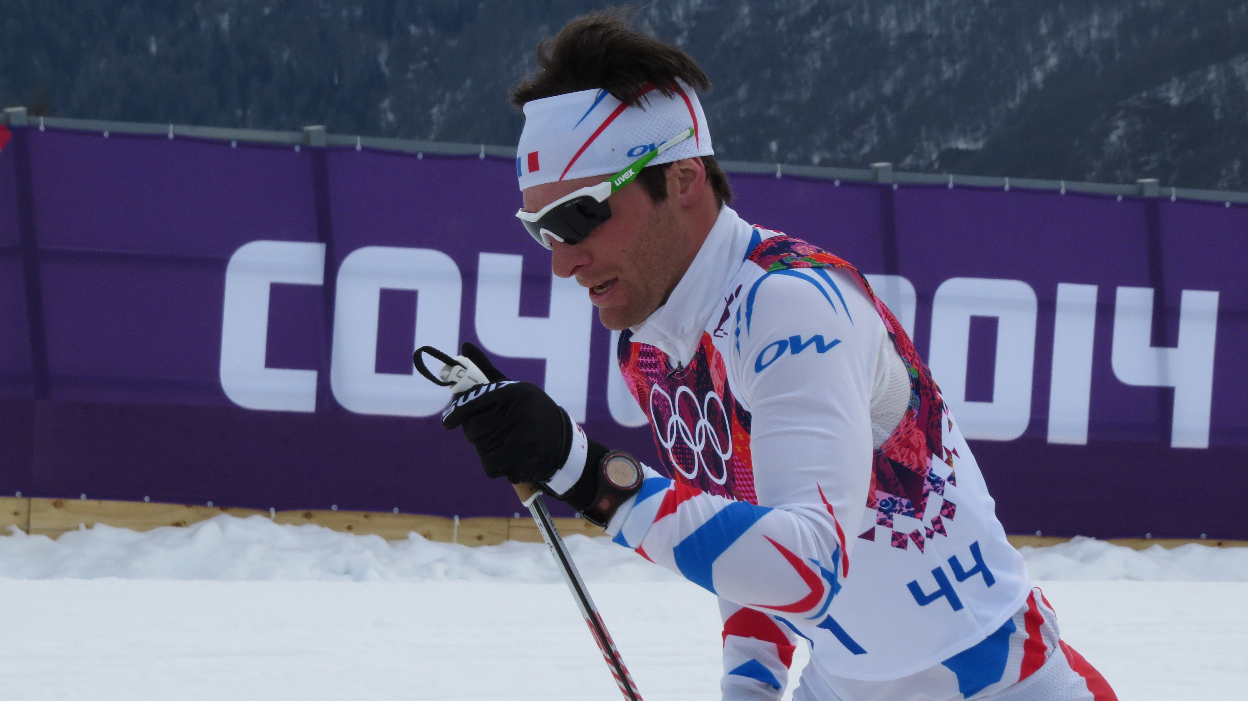 Лыжные гонки на зимних Олимпийских играх 2014 — 15 км классическим стилем (мужчины)